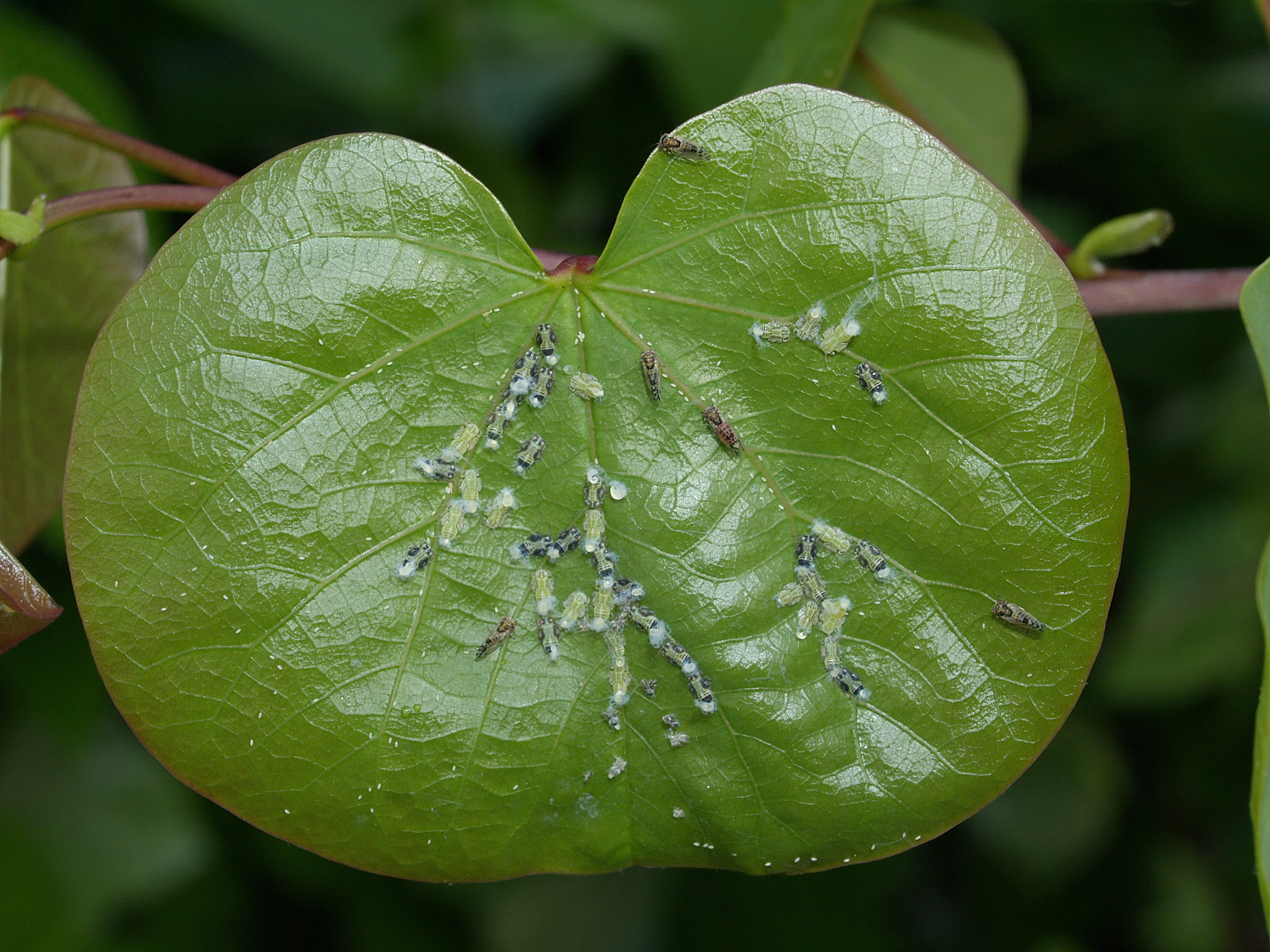 Cacopsylla pulchella (Psyllidae) sobre hojas de Cercis siliquastrum. Madrid, barrio de Peñagrande.